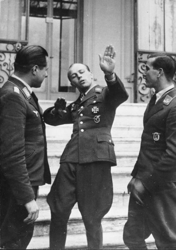 41 mal Sieger im Luftkampf Hauptmann [Helmut] Wick, der erfolgreiche deutsche Jagdflieger, der vom Führer mit dem Eichenlaub zum Ritterkreuz des Eisernen Kreuzes ausgezeichnet wurde, schildert hier seinen Kameraden seine letzten Kämpfe, bei denen er fünf Spitfire hintereinander zum Absturz brachte. A 87242 K.G.